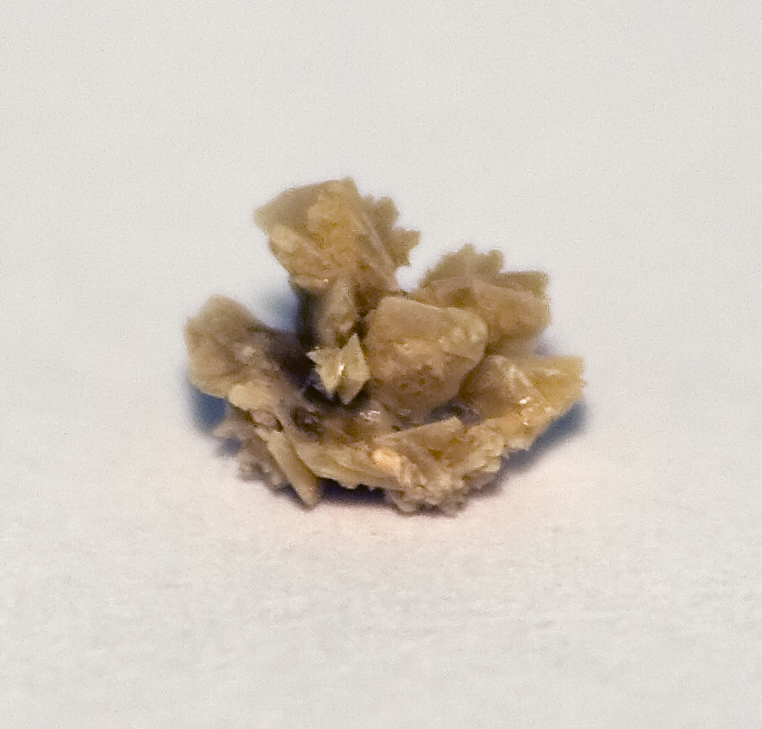 Photographie d'un calcul rénal. Composition : Oxalate de calcium dihydraté Taille : 8 mm